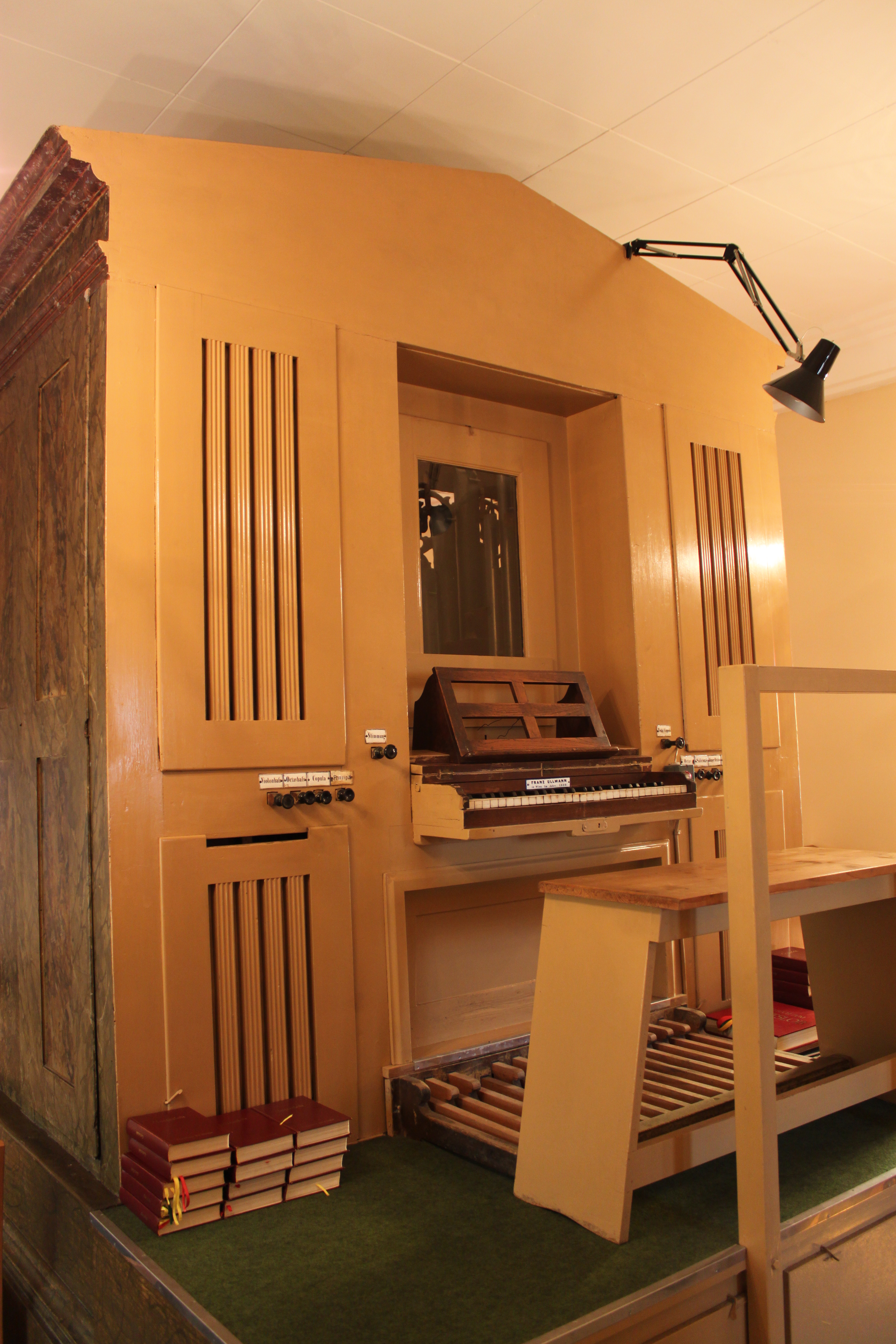 Spielanlage der Orgel der Filialkirche Kleinrötz